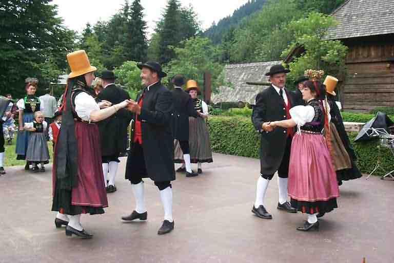 Die Furtwanger Tracht bei einer Aufführung der Trachtengruppe im Freilichtmuseum Vogtsbauernhof 1999. Man beachte den Strohzylinder der Damen, der "Schwarzwälder" Bollenhut dagegen wird nur in drei Dörfern getragen, dazu gehört Gutach, der Standort dieses Freilichtmuseums.